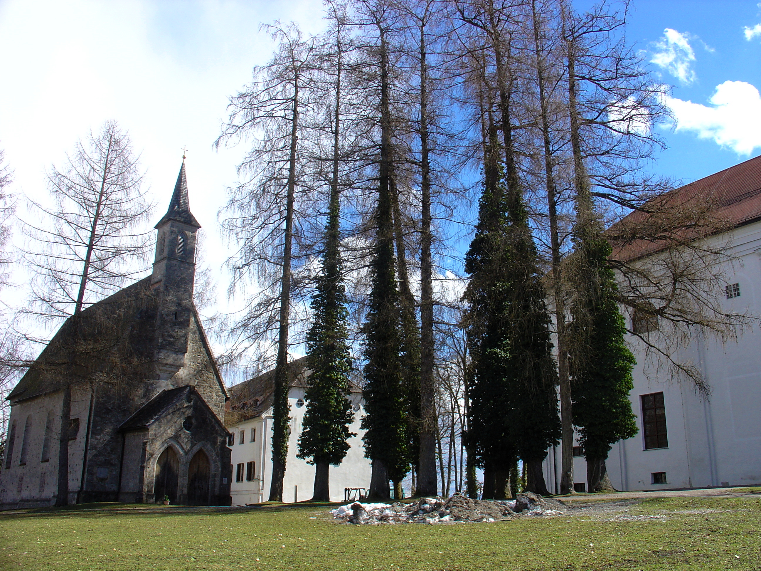 Kloster Herrenchiemsee